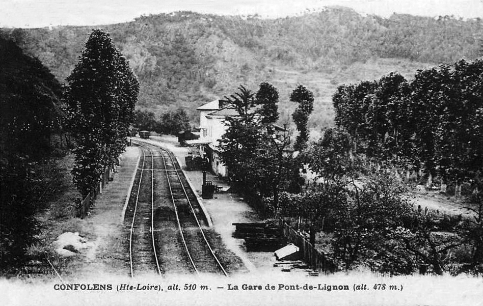 La gare de Pont-de-Lignon au début des années 1900.